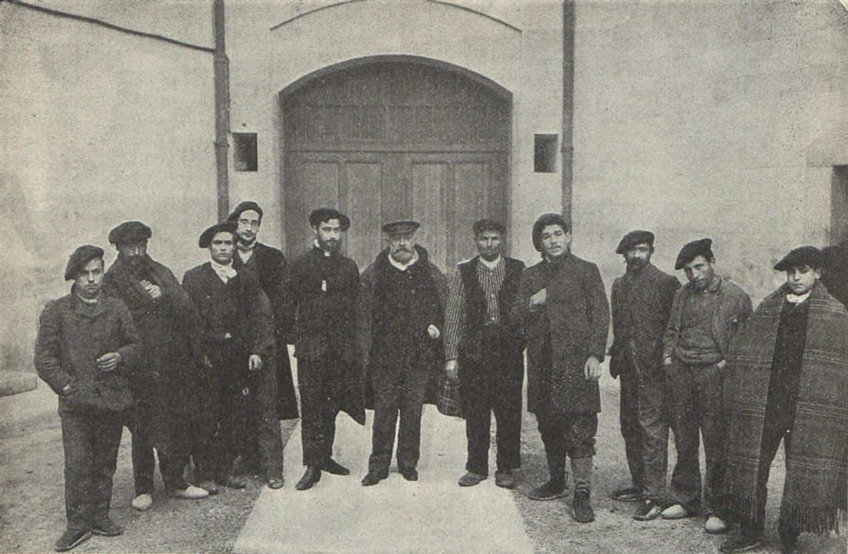 Partida carlista copada en Rajadell por la Guardia Civil en 1907. En el centro el titulado general Moore; a su derecha su hijo y a su izquierda el dueño de la "Torre del Forn"